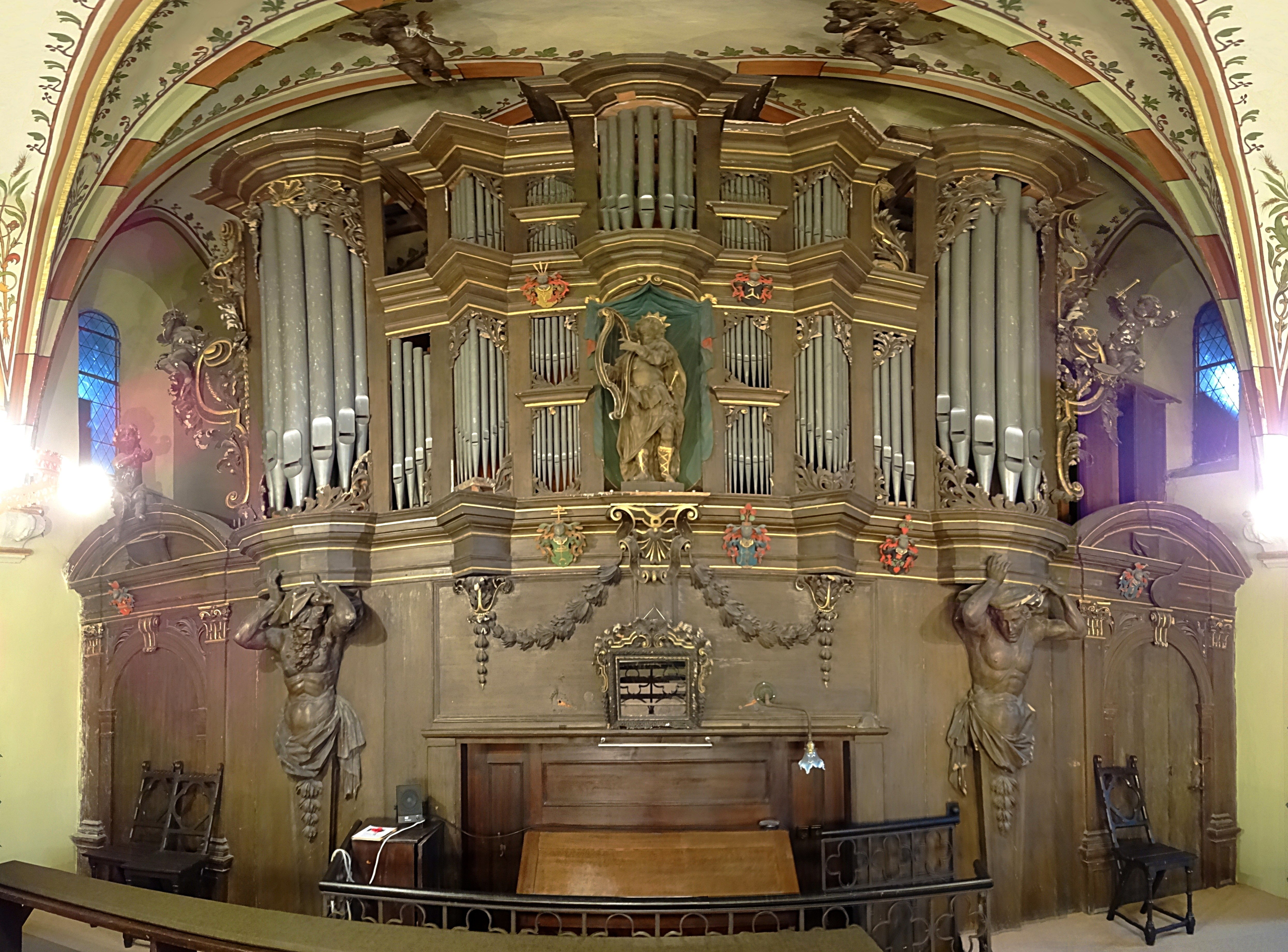 Orgel von Friedrich Wilhelm Ernst Röver (1902)[1] im historischen Prospekt von Matthias Hartmann (1712)[2] mit geschnitzten Verzierungen vom preußischen Hofbildhauer Johann Georg Glume[3] in der Stadtkirche St. Jacobi, Wanzleben, II/P 30